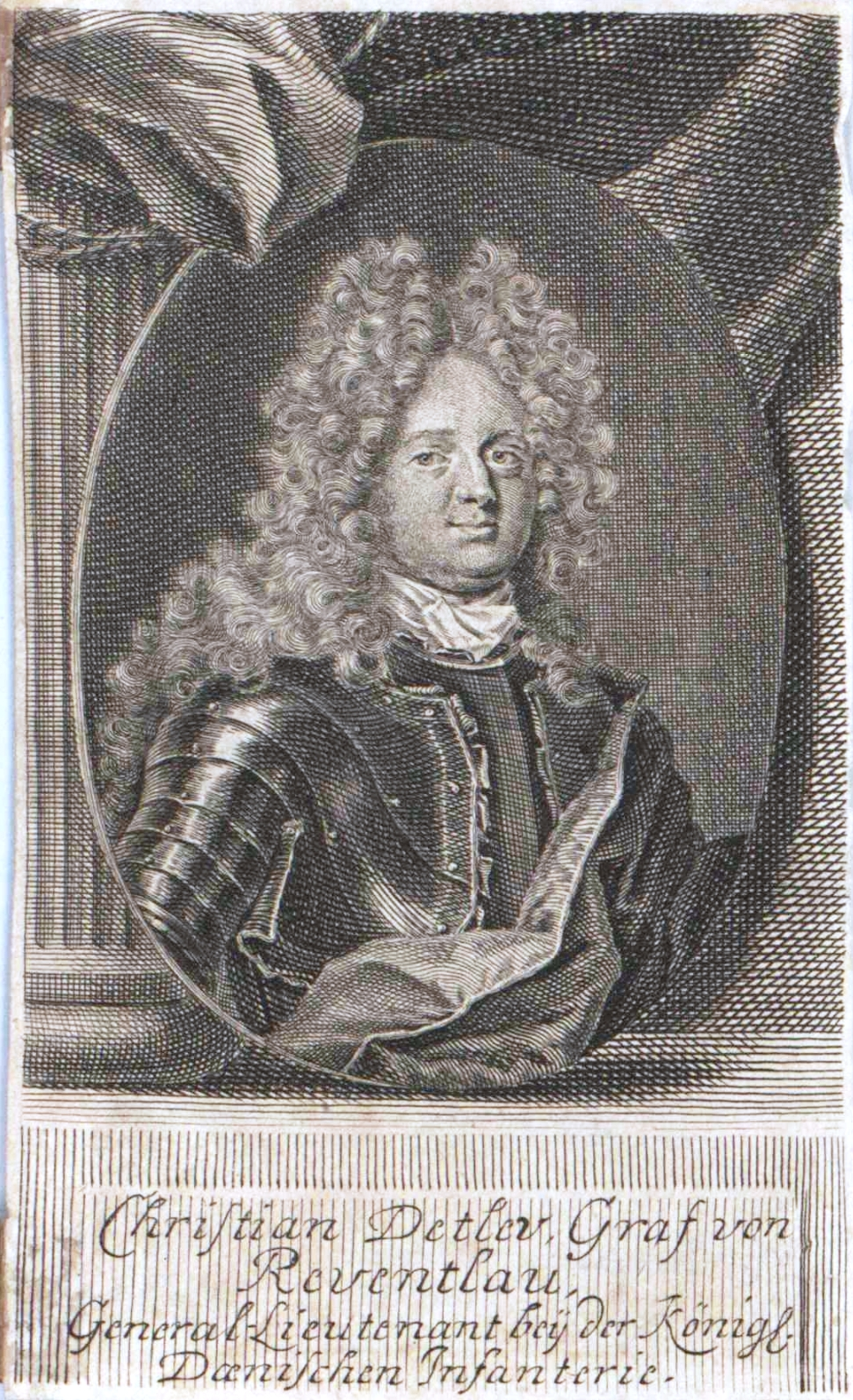 CDReventlow.